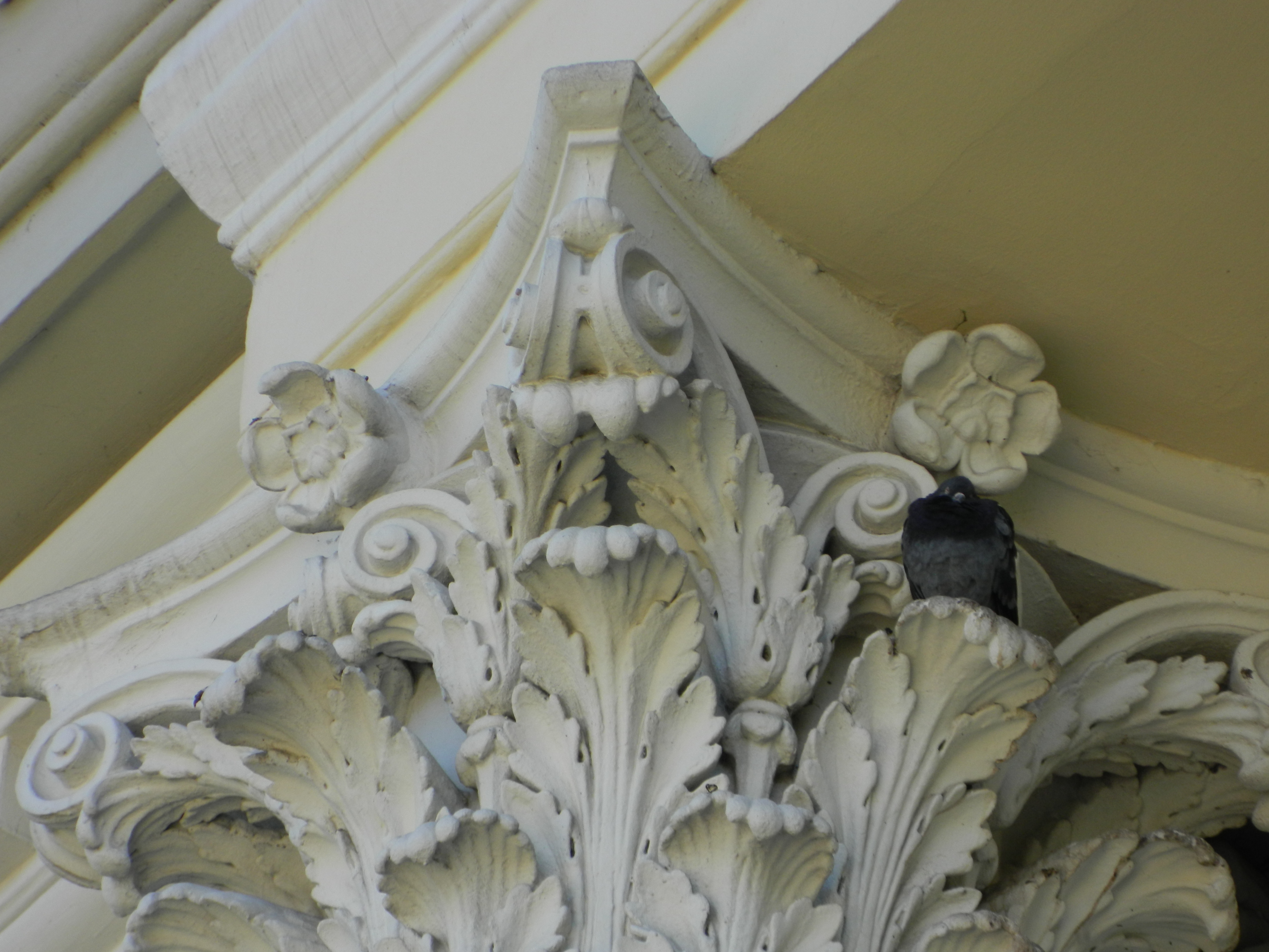 гнездо из једног од стубова, кућа овог голуба већ годинама